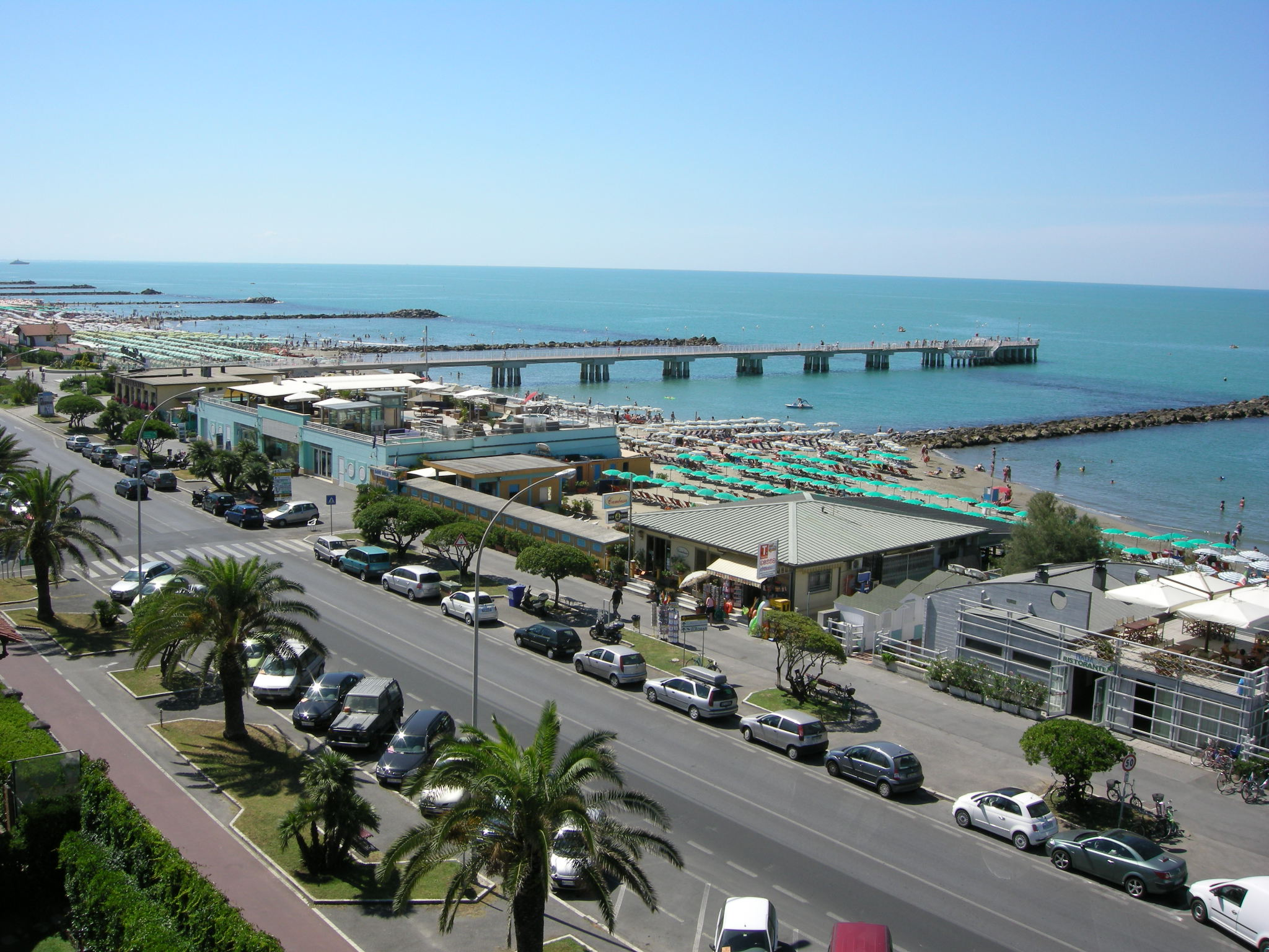 Marina di massa, veduta